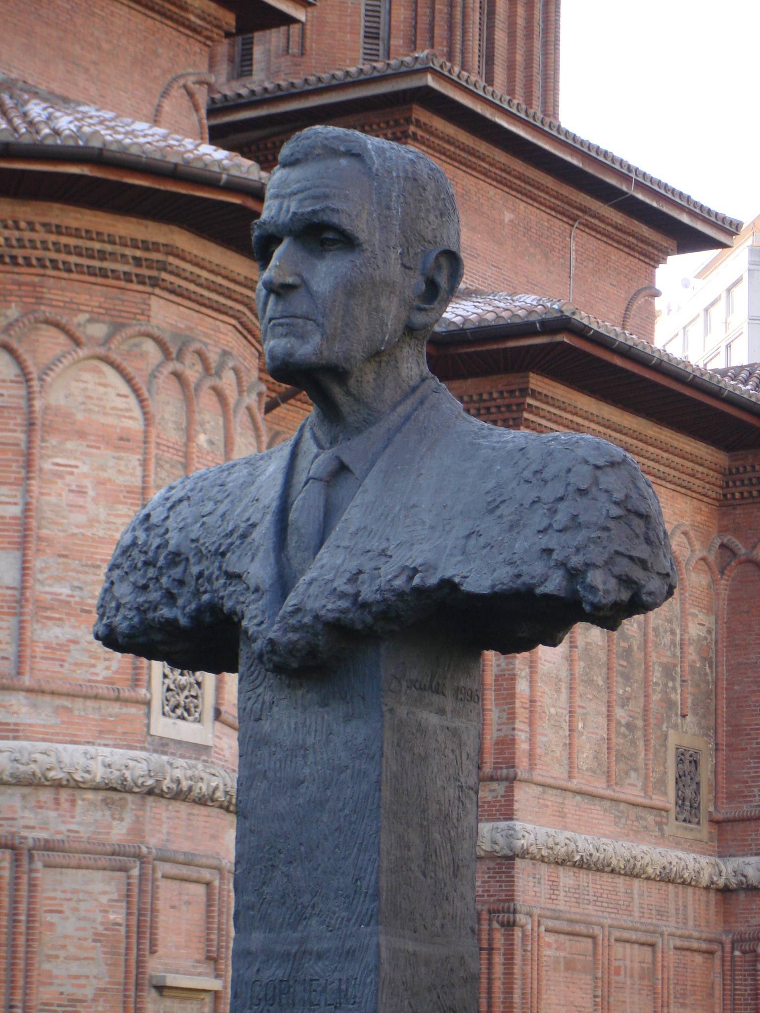 Bustul lui Corneliu Coposu, Bucureşti, sculptor Mihai Buculei, 1996